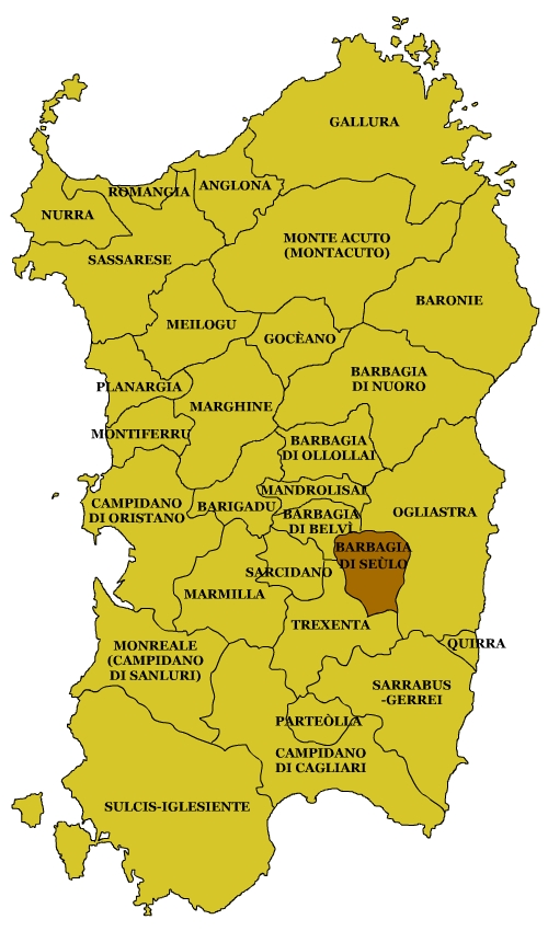 Sardinian Subregions